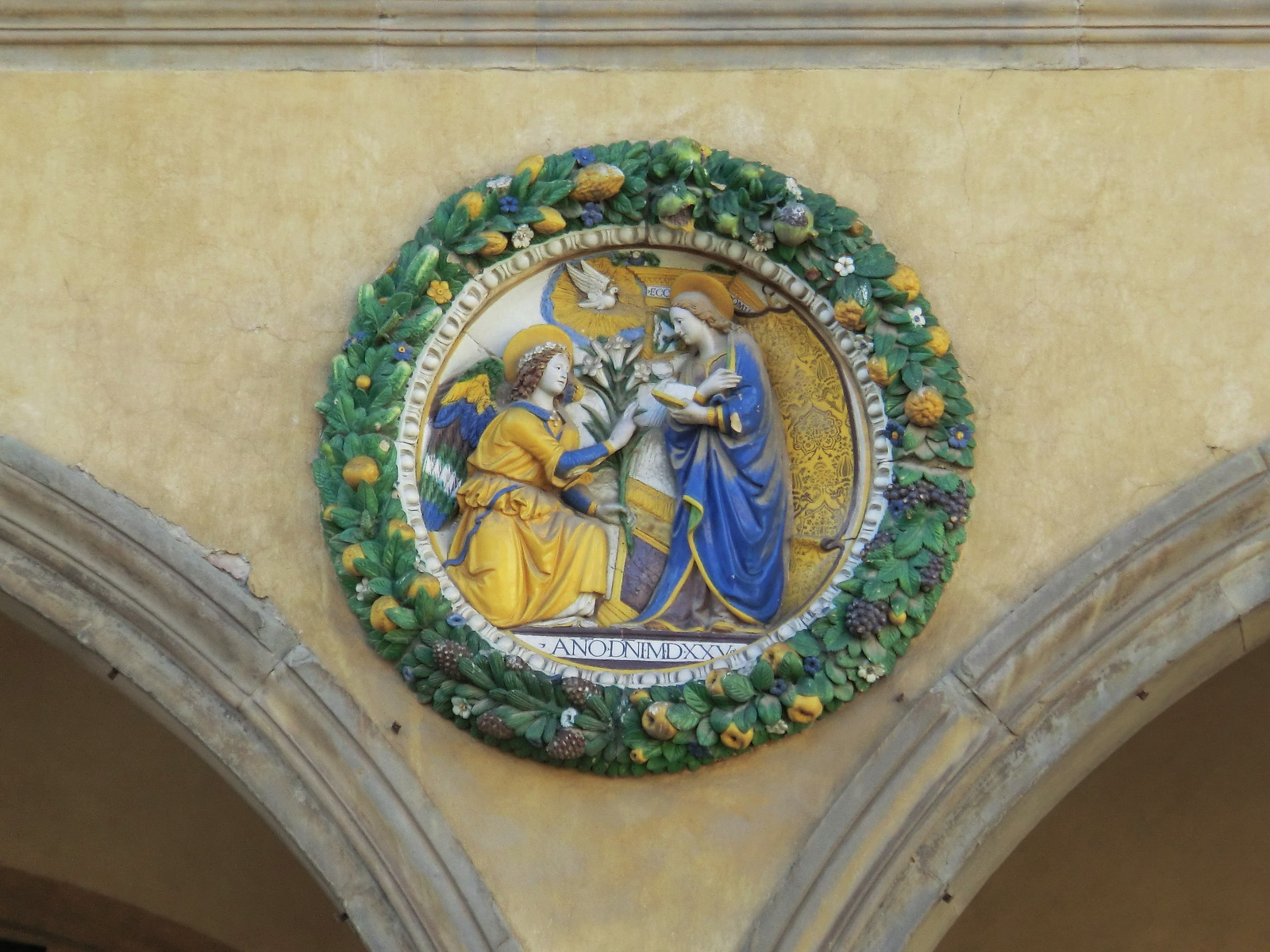 Ospedale del Ceppo, Pistoia, Italy